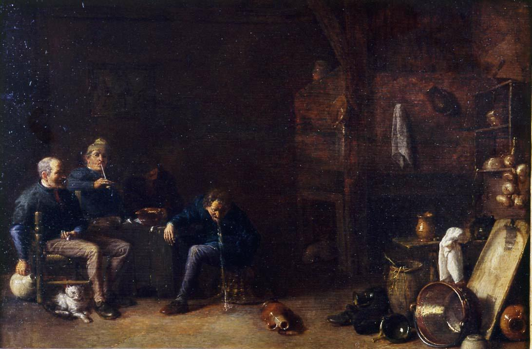 La obra representa el interior de una taberna en la que hay varios individuos bebiendo.